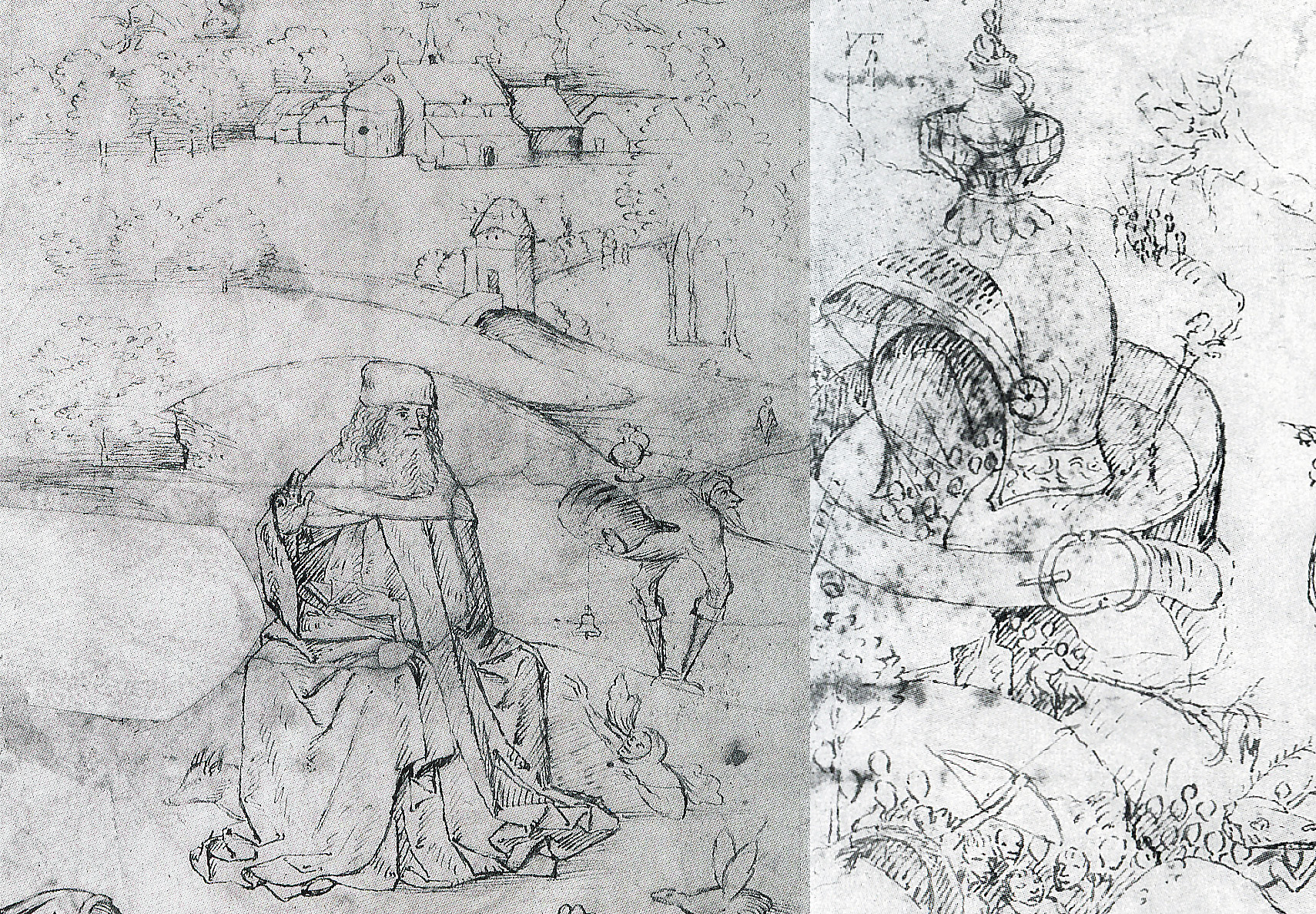 Le Grand Œuvre de Leonardo (dessin à la plume et à l'encre brune) = La Tentation de saint Antoine du cabinet des estampes de Berlin (All.) + la Scène de l'Enfer du cabinet des estampes de Dresde (All)